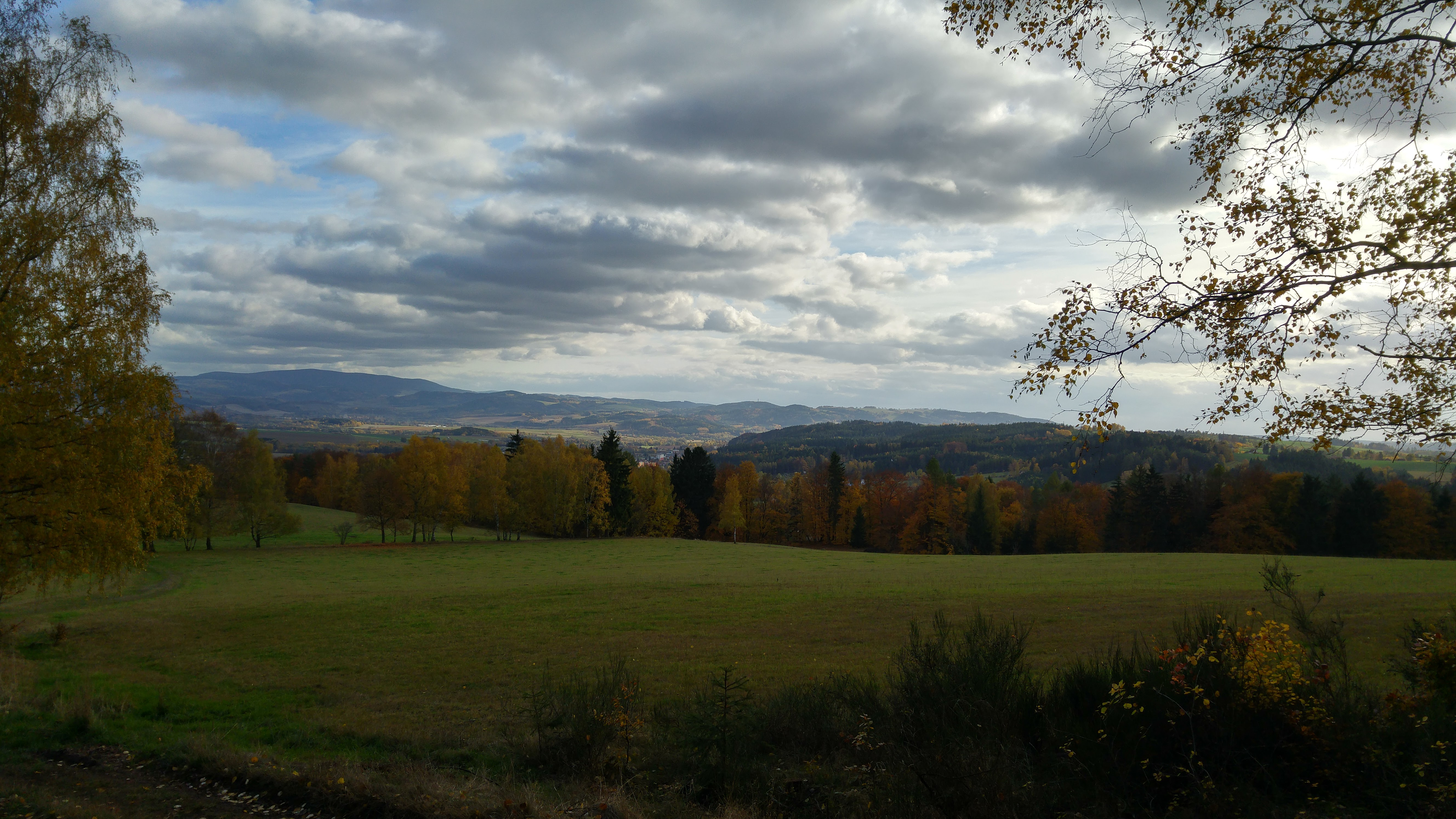 Severní část Náchodské vrchoviny: pohled z Jestřebích hor, vpravo východ Červenokostelecké pahorkatiny, vlevo pod ní Hronovská kotlina, ve středním plánu sever Sedloňovské vrchoviny, nejvýše pak Vrchmezí